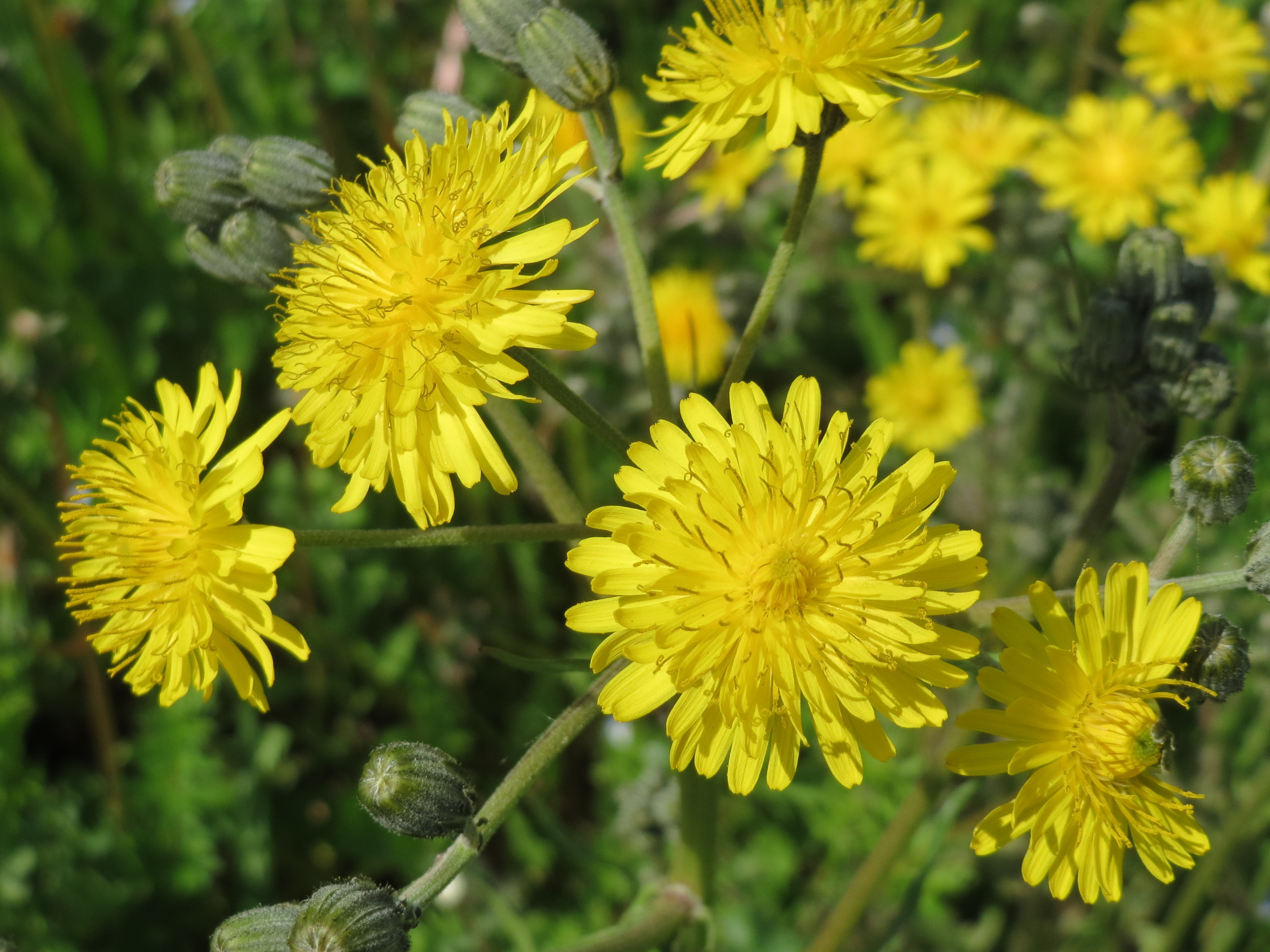 Gewöhnliches Bitterkraut (Picris hieracioides) im Neuenheimer Feld in Heidelberg